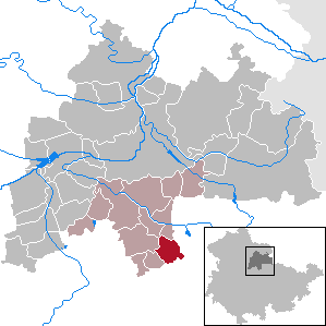 Ollendorf in Thuringia - District Sömmerda